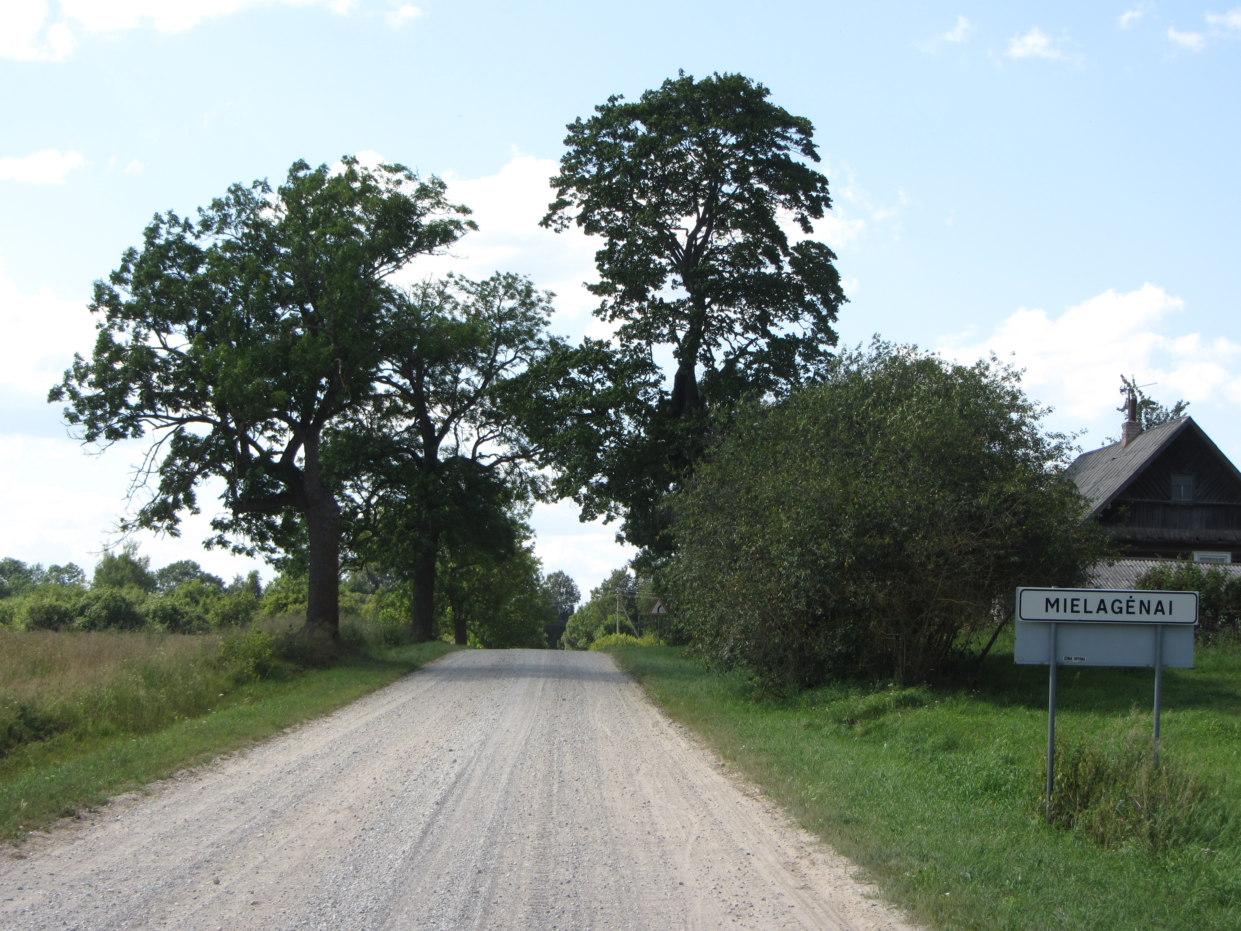 Mielagėnai, Lithuania